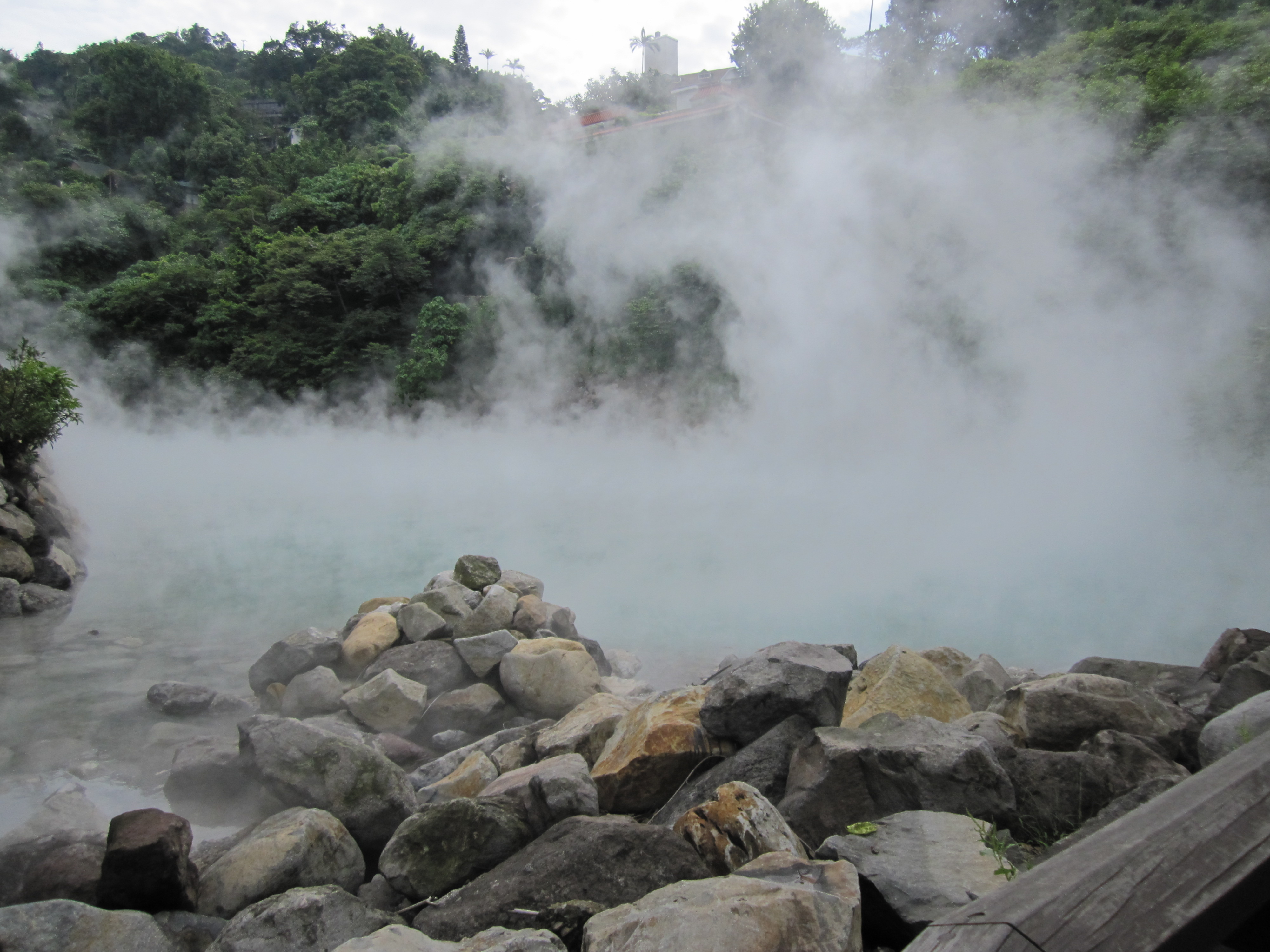 地熱谷溫泉冒起的蒸氣